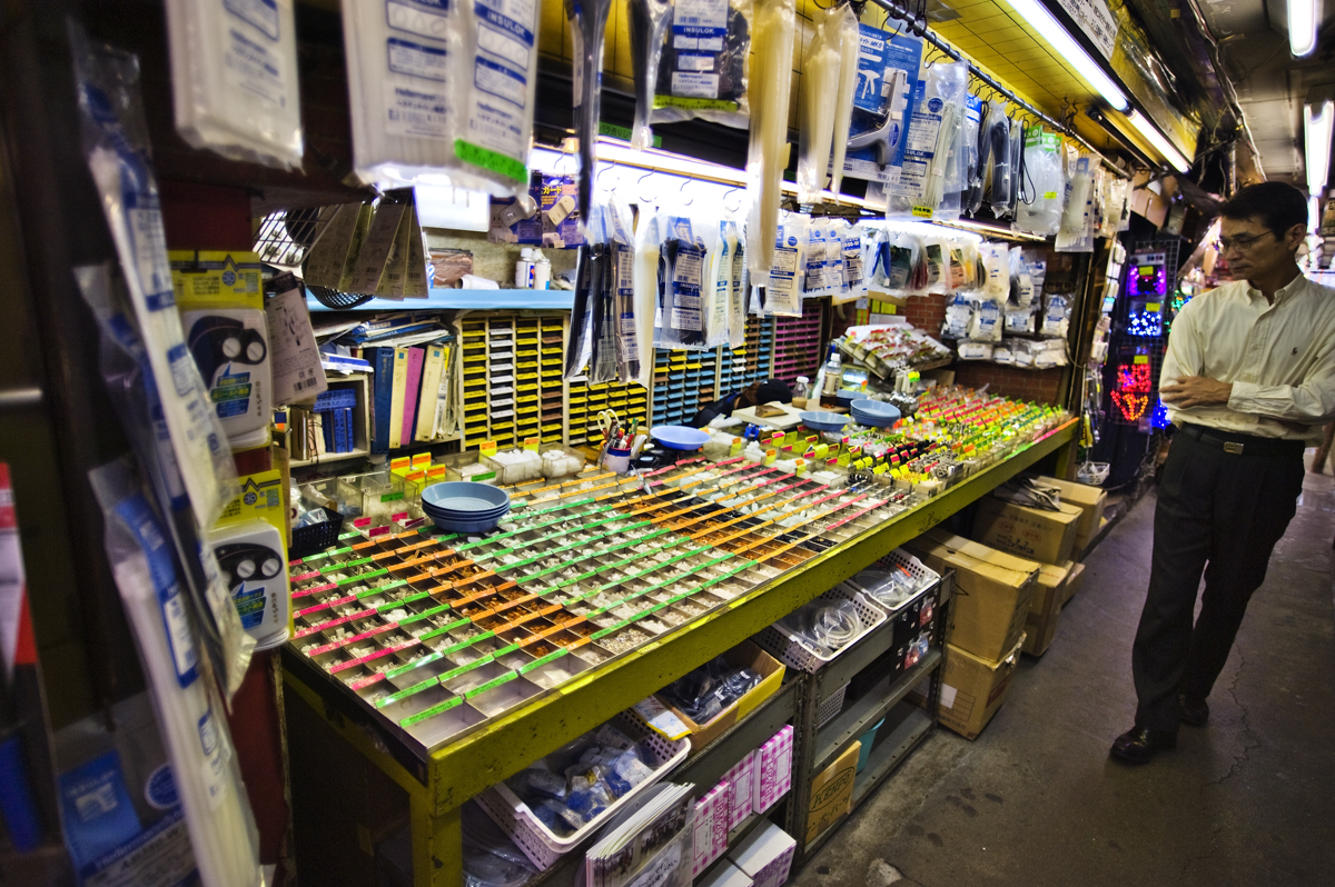 _DSC1718